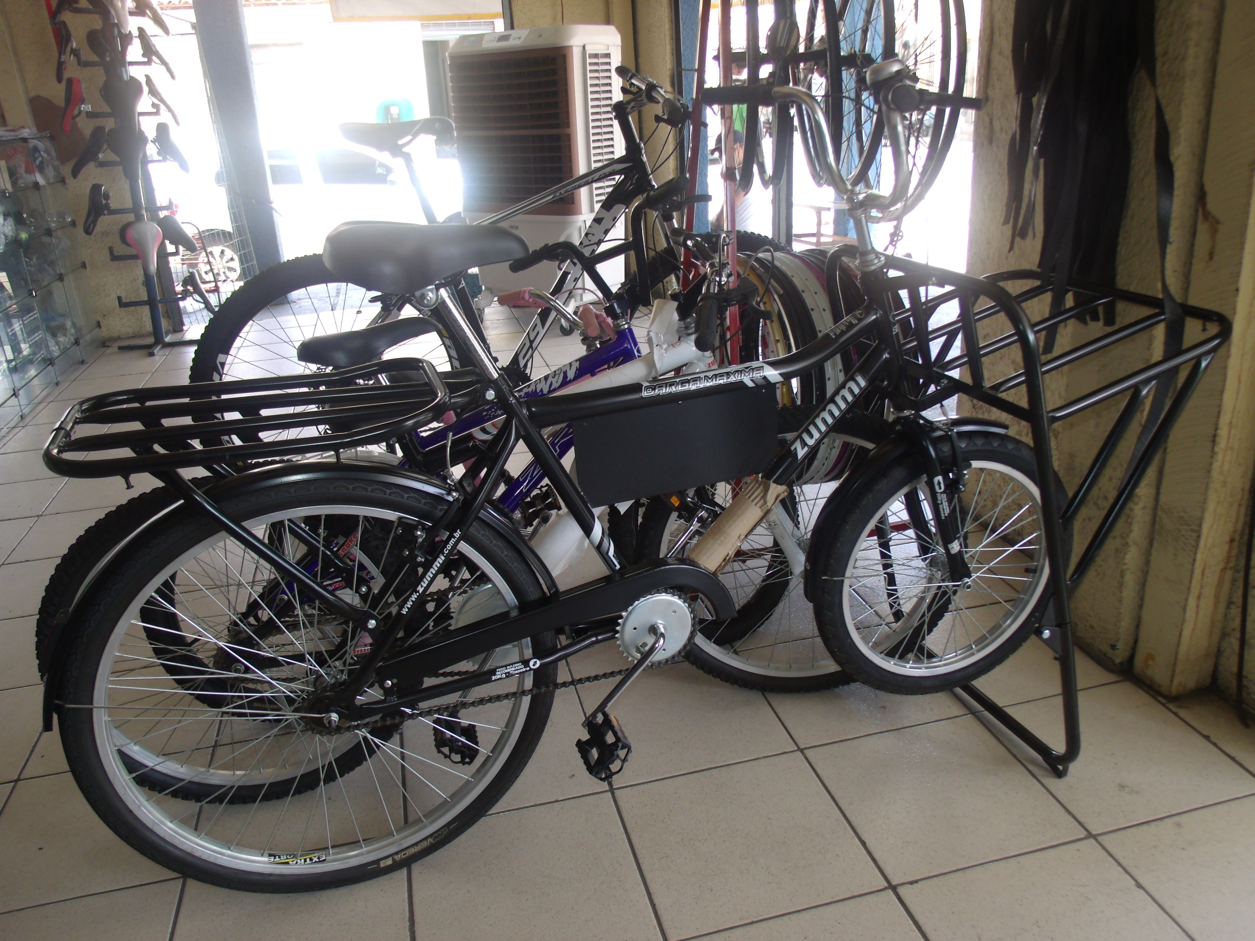 Bicicletas de Pernambucoː Zummi de carga.